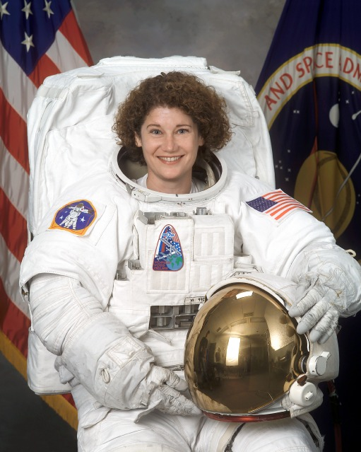 Astronaut Susan Jane Helms